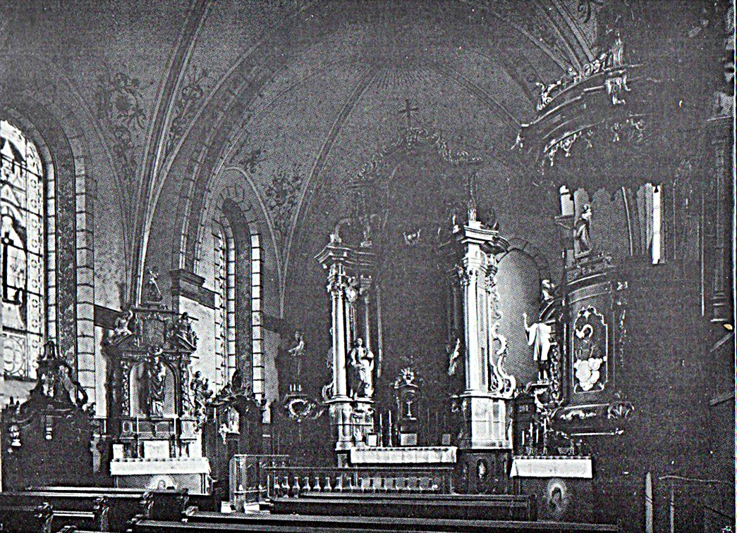 St. Nikolaus Altengeseke\St, Nikolaus Altengeseke, Anischt der der Altäre von Albert Ludorff, vor 1910